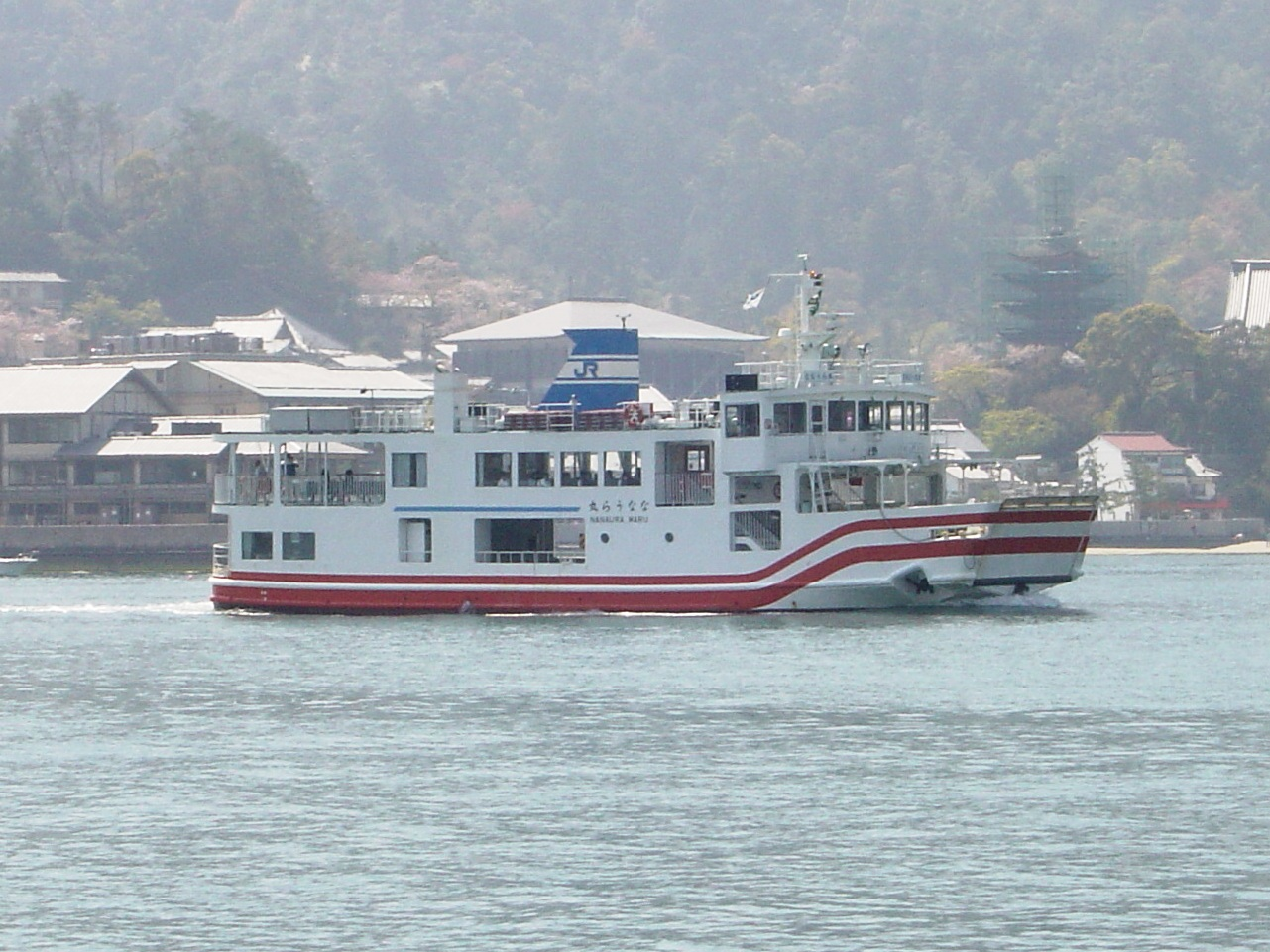 JR宮島フェリー ななうら丸